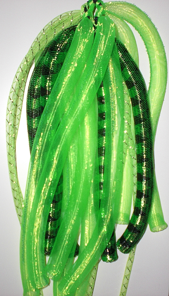 Cyberlox-Haarteil